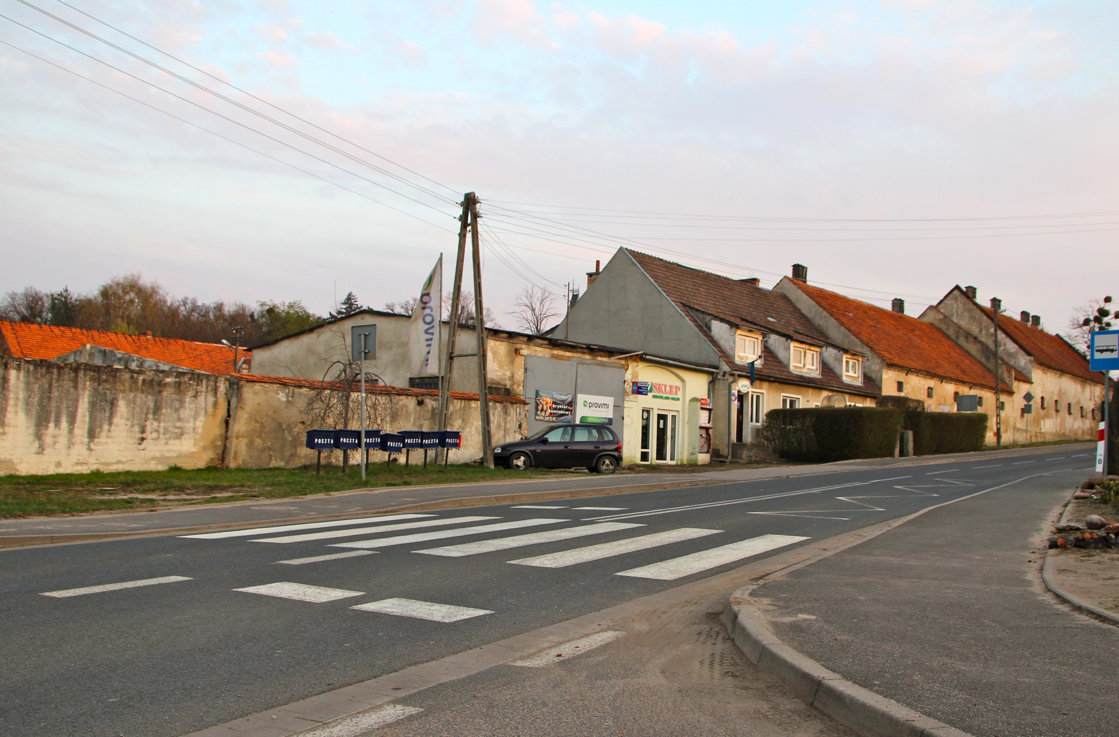 Wielka Lipa – wieś w Polsce w województwie dolnośląskim, w powiecie trzebnickim, w gminie Oborniki Śląskie.